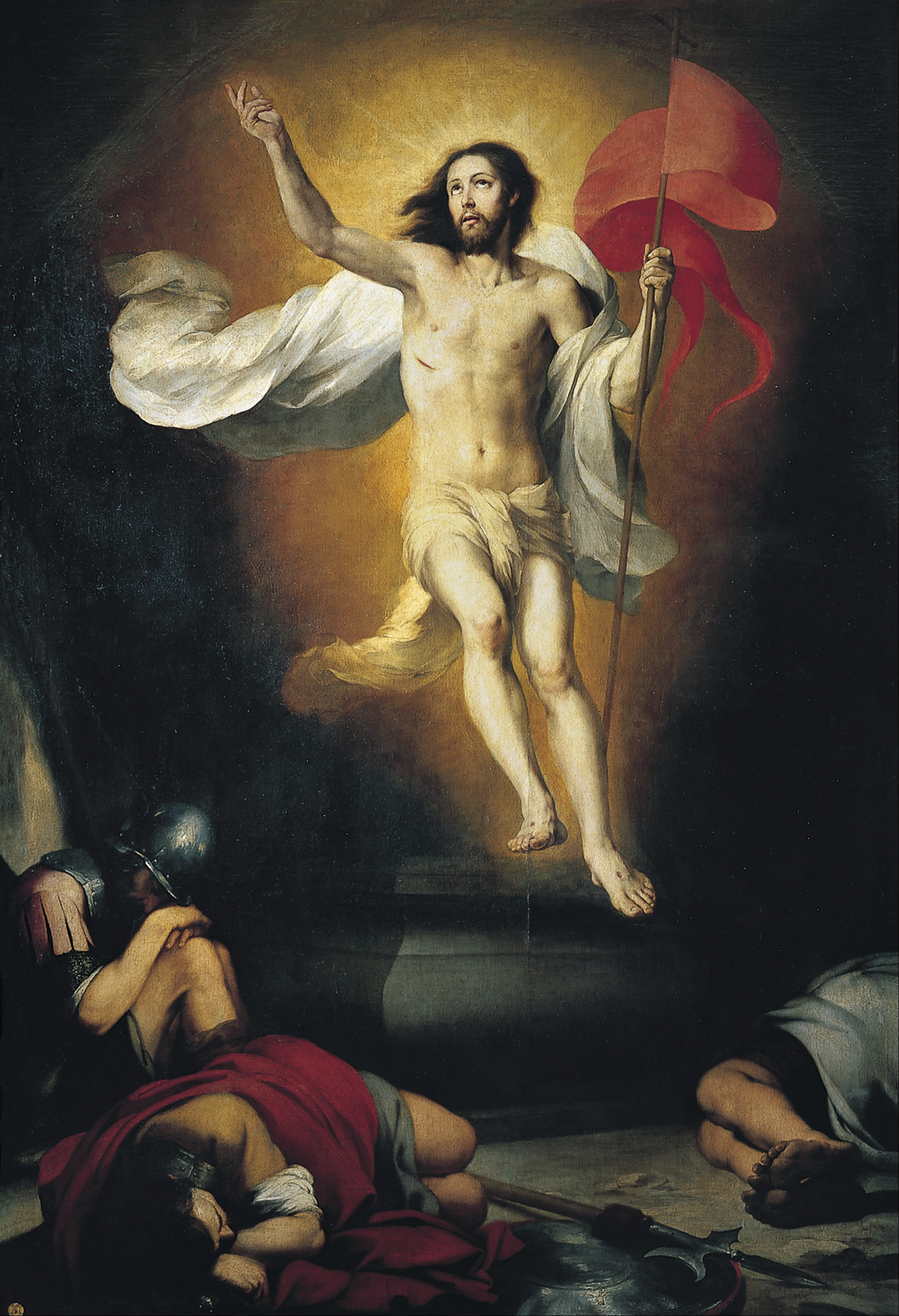 El lienzo representa a Cristo resucitado, y es uno de los cuatro lienzos del pintor sevillano Bartolomé Esteban Murillo que se conservan en la Real Academia de Bellas Artes de San Fernando, situada en la ciudad de Madrid, (Spain).